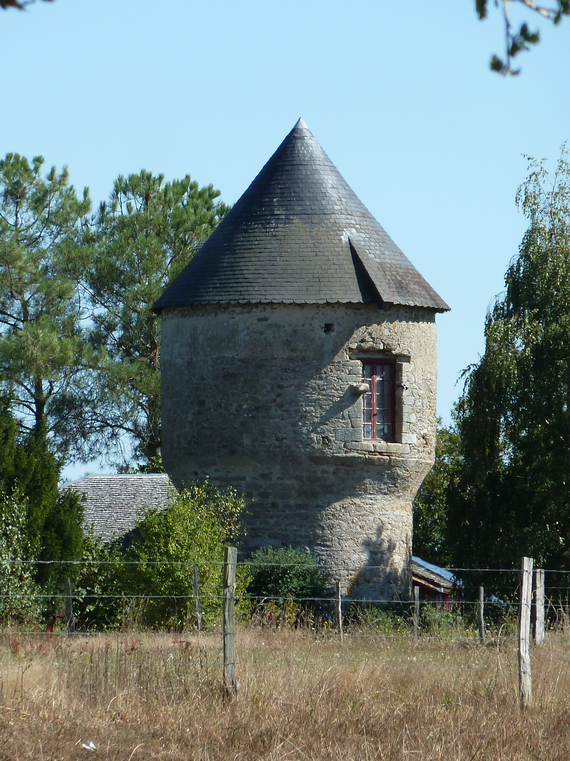 Moulin de Rochoux Vue du Nord Ouest